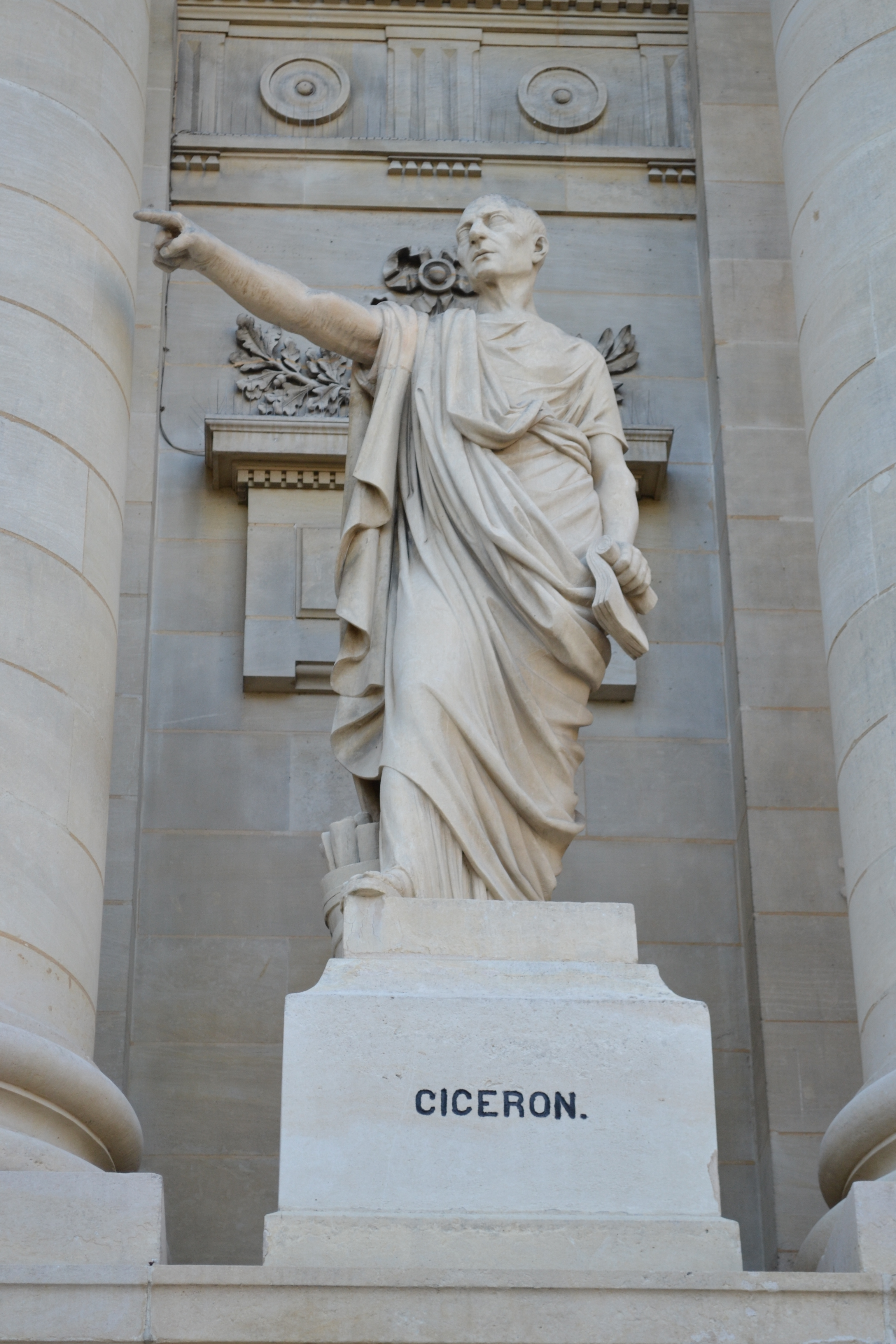 statue de cicéron sur la parvis du palais de Justice d'Amiens